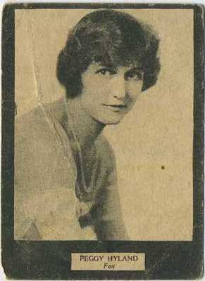 Peggy Hyland